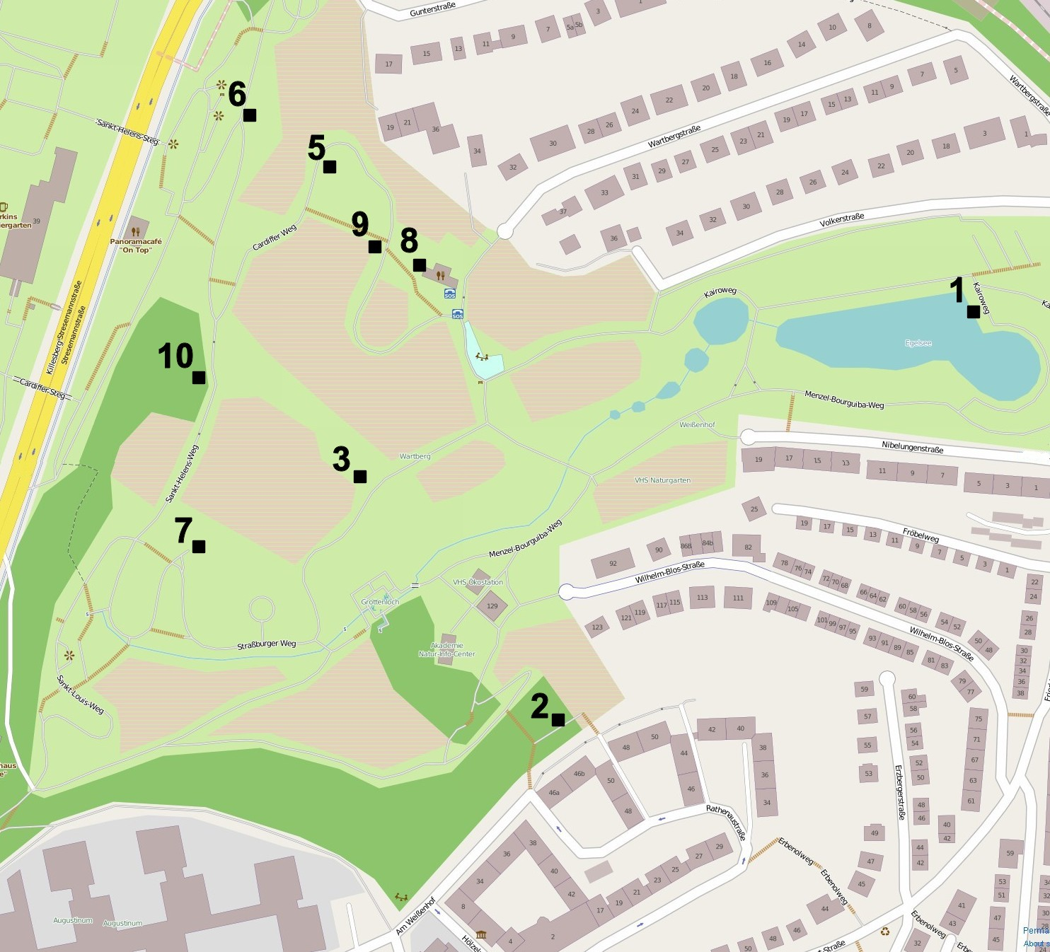 Wartberg, Stuttgart, Lageplan der Lyrikstationen „Die IGA und das Wort“.